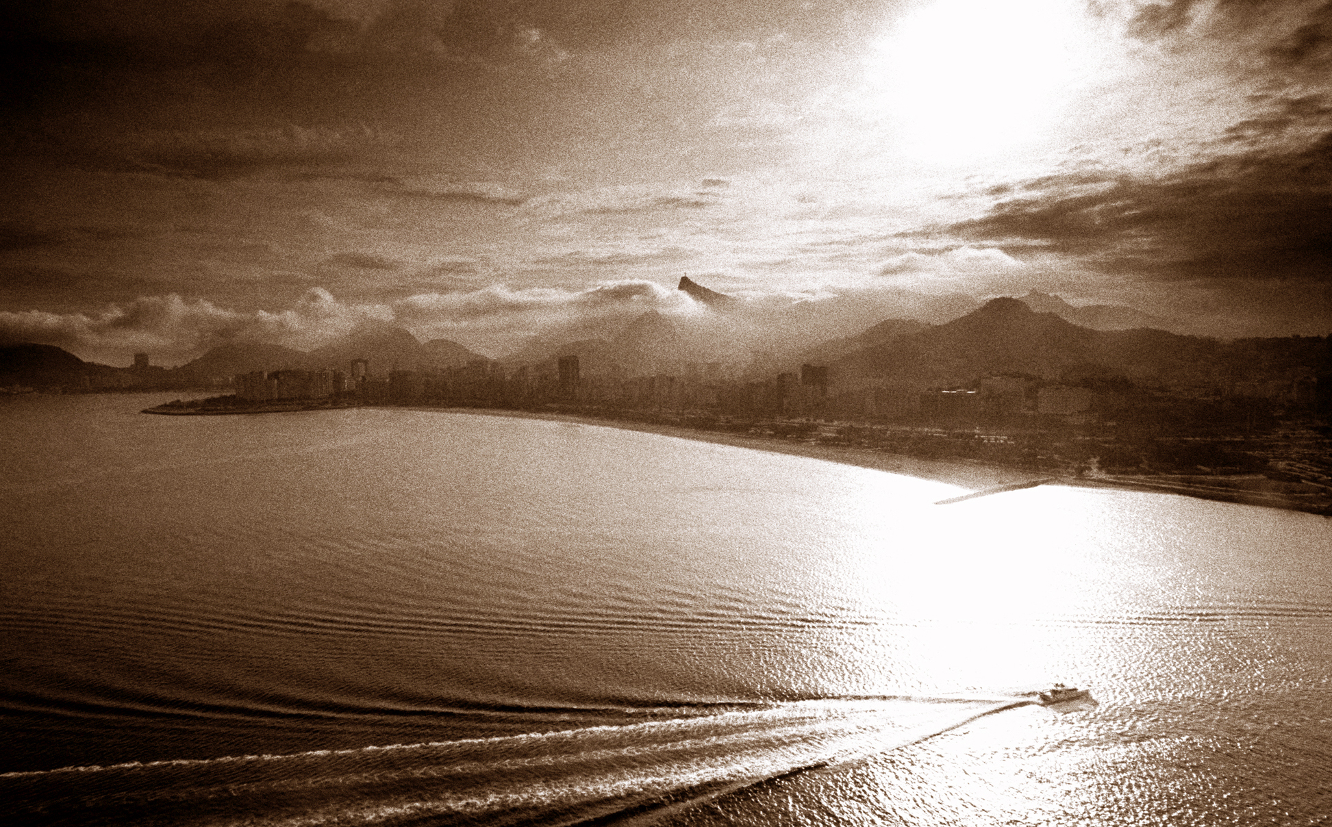 Decolando de helicóptero do Aeroporto Santos Dumont ao fundo Cristo Redentor